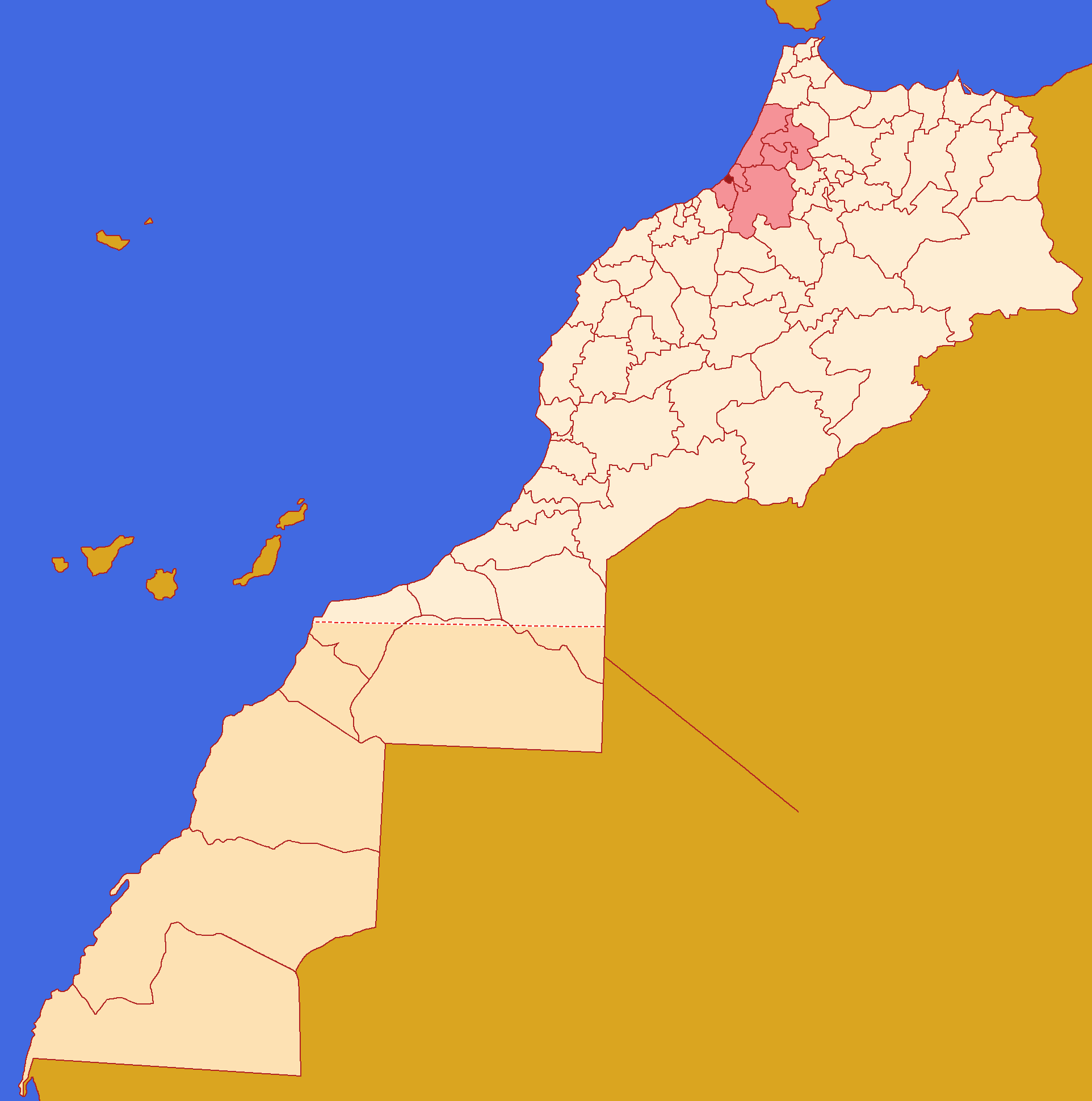 Localização da prefeitura de Rabat, dentro da região de Rabat-Salé-Kénitra,conforme a reforma administrativa de 2015